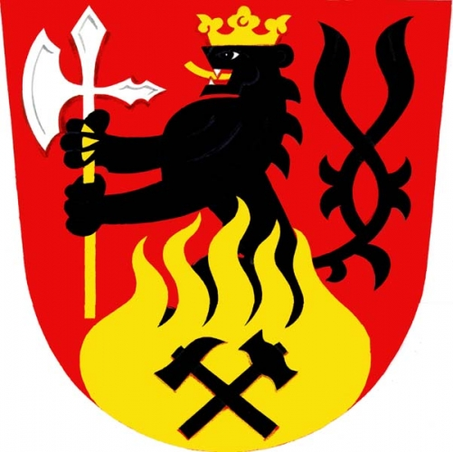 Znak, Vernířovice, okres Šumperk